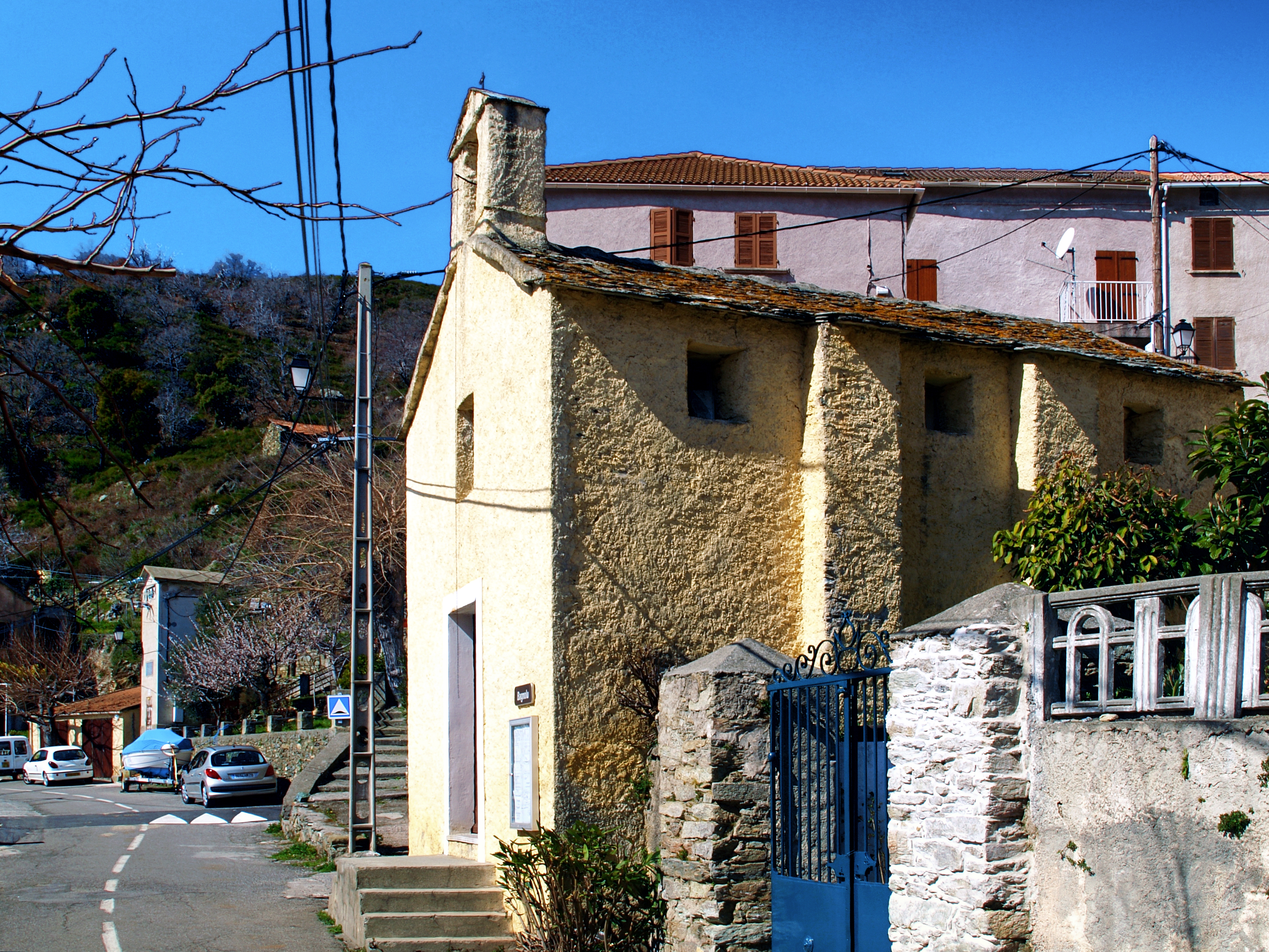 Campitello, Costere (Corse) - Hameau de Bagnolo